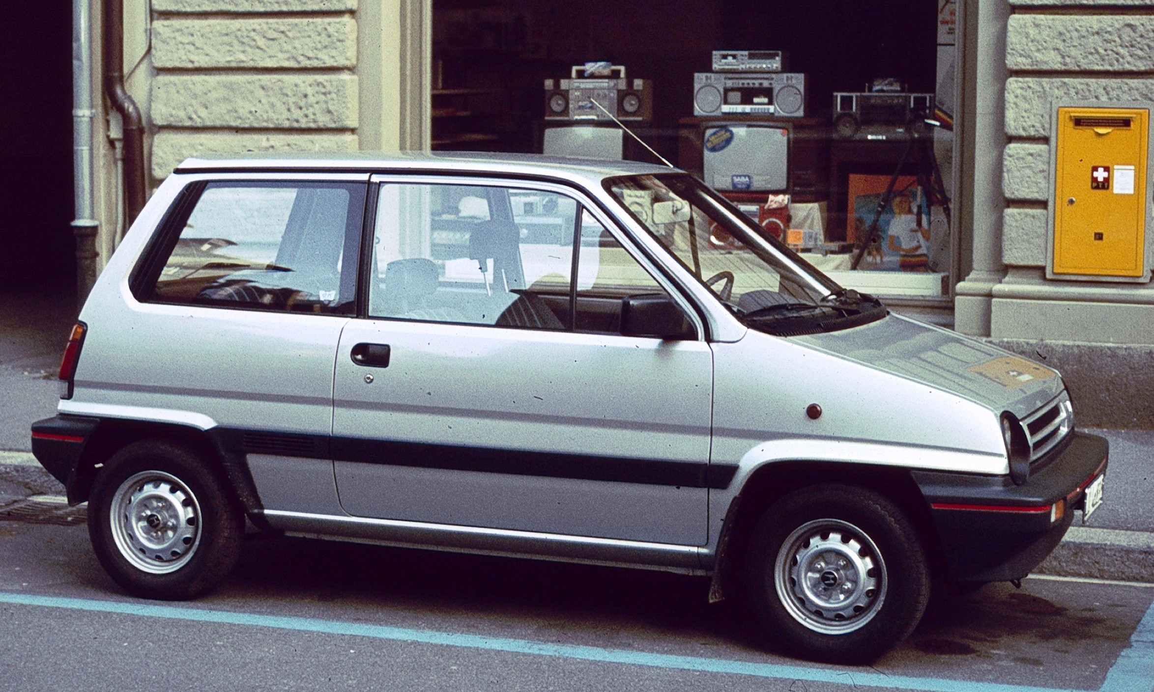 Honda Jazz in Luzern